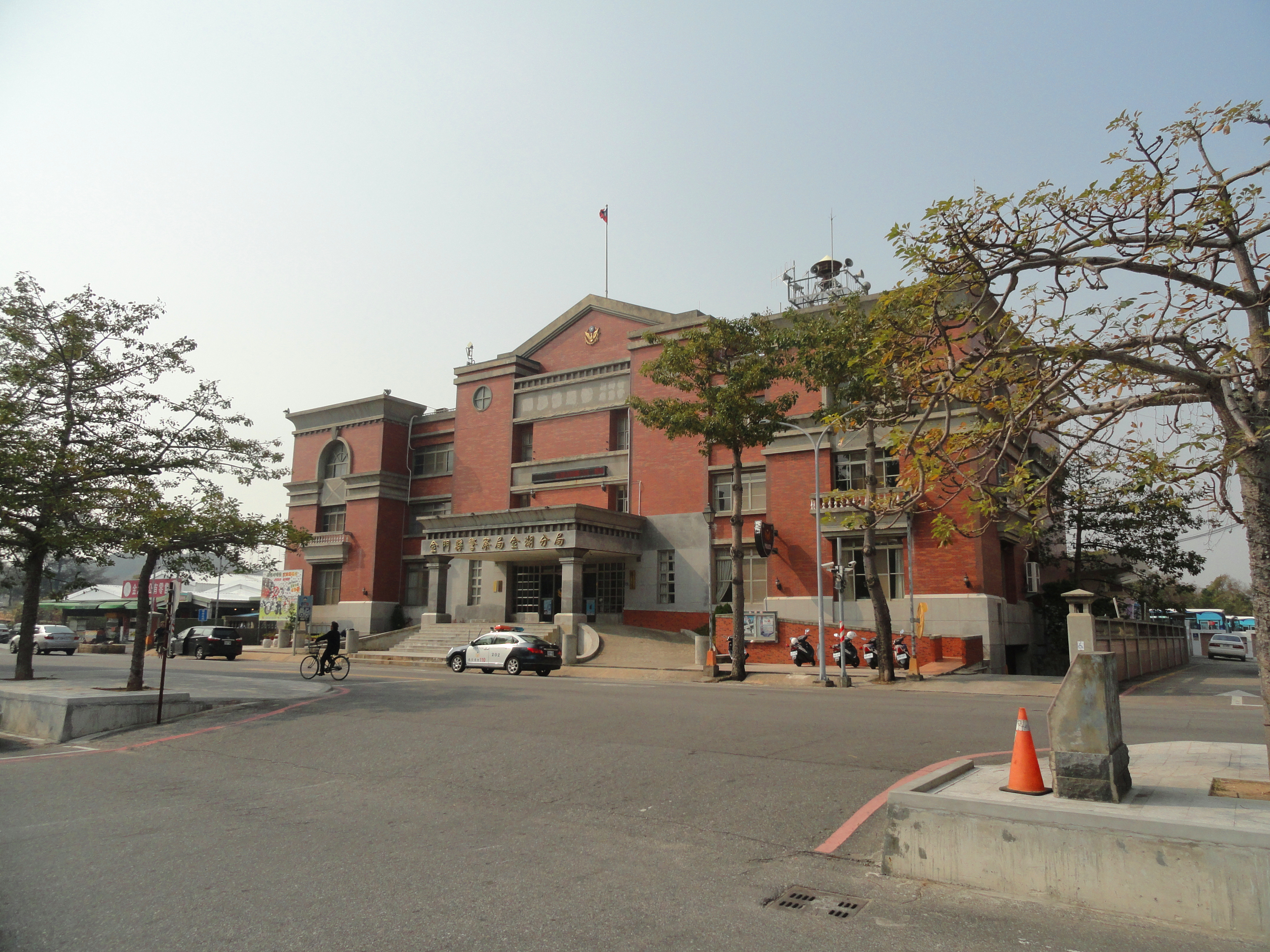 金門縣警察局金湖分局中文（中国大陆）: 金门县警察局金湖分局